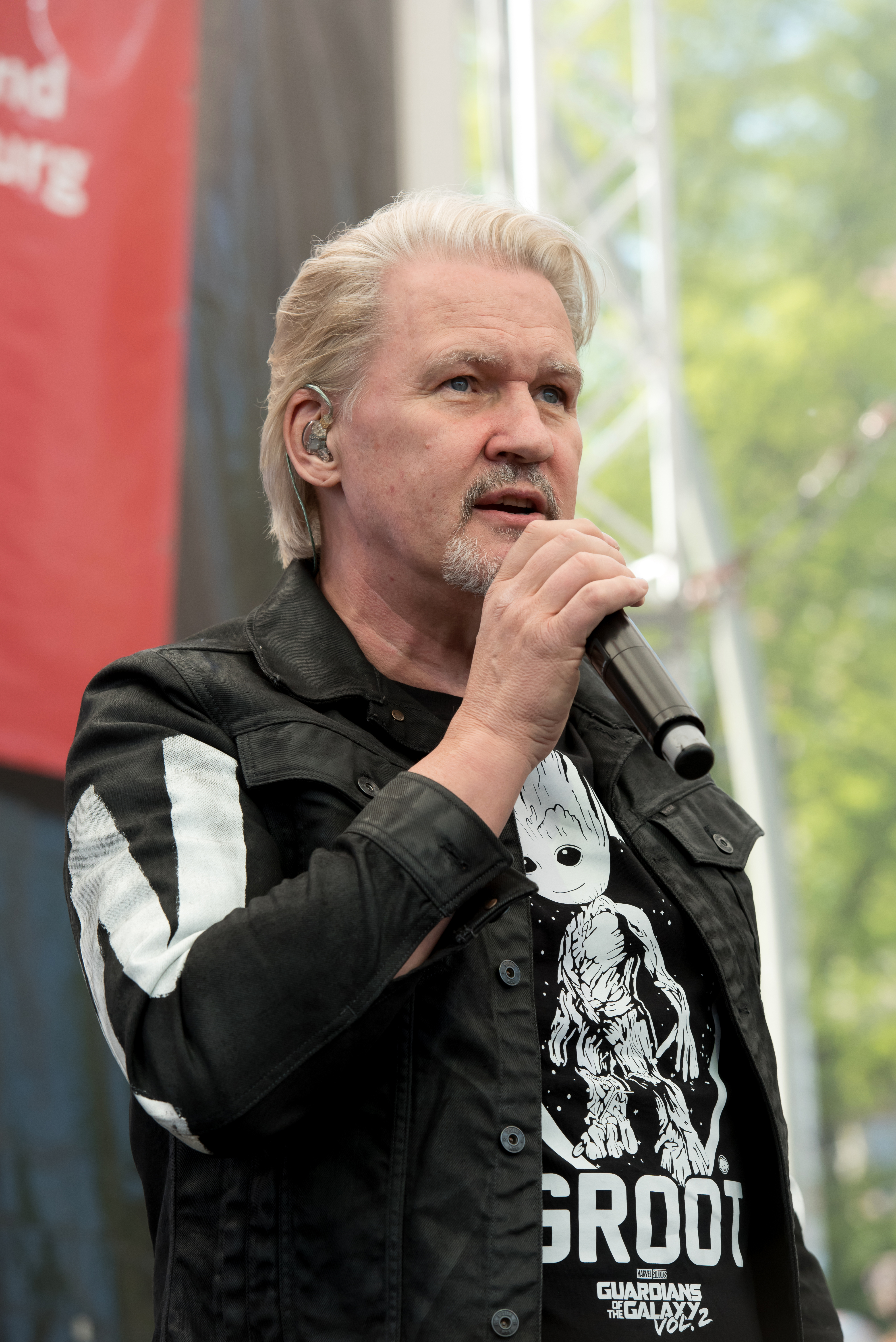 Johnny Logan beim Hafengeburtstag 2017